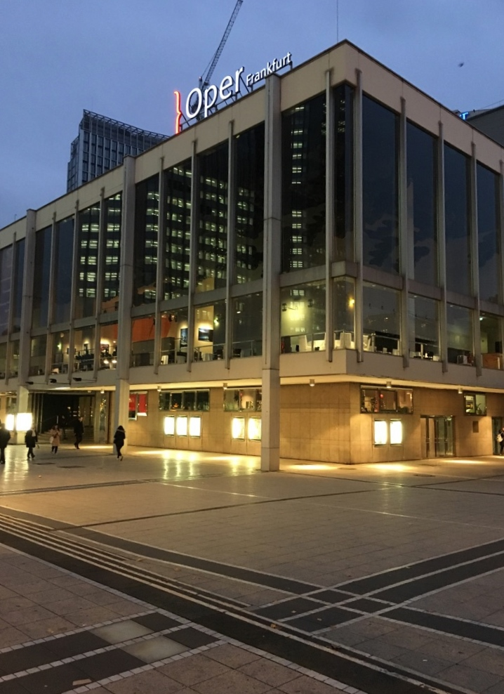 Opern- und Schauspielhaus Frankfurt